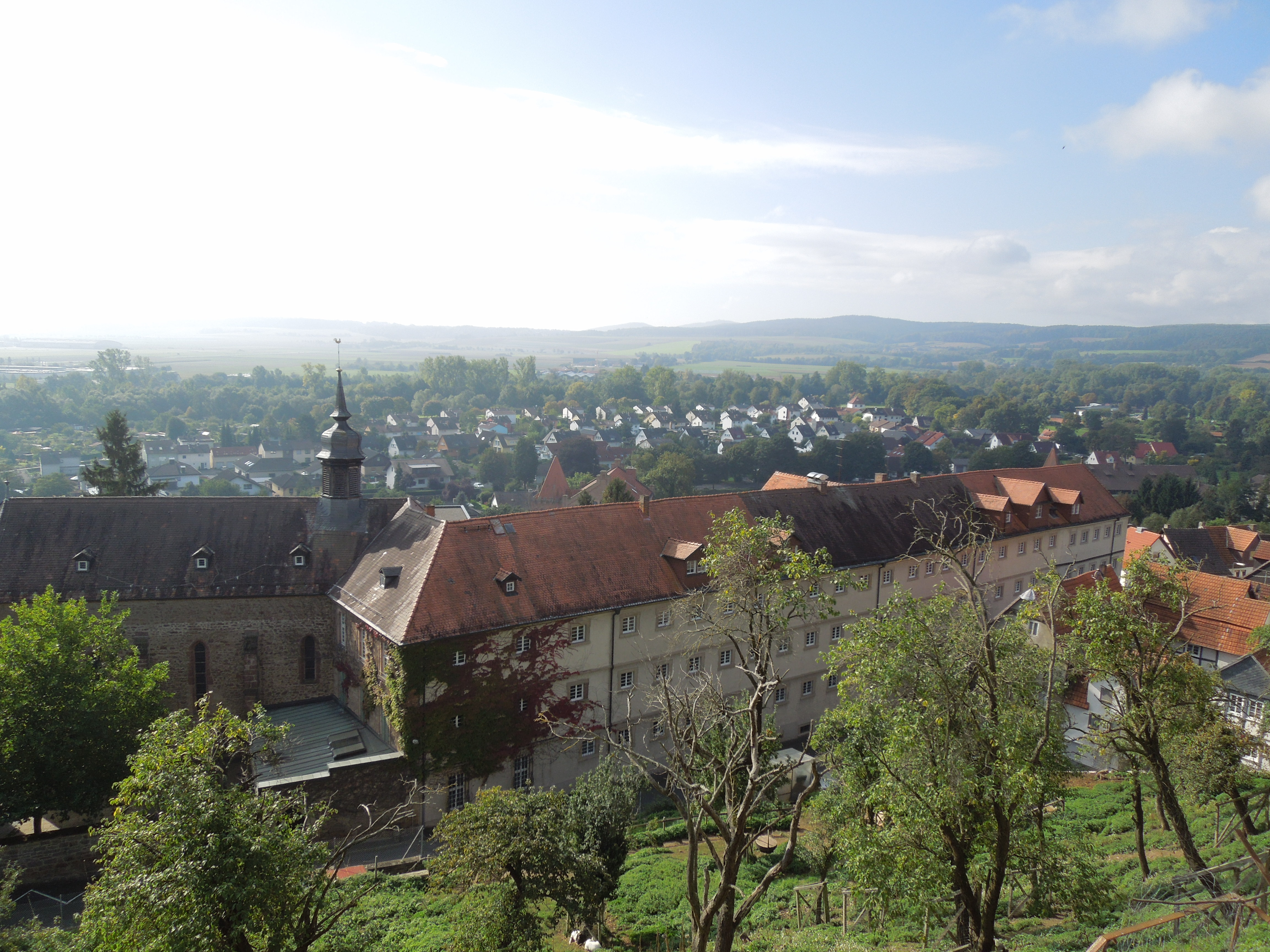 Blick vom Domhügel auf das ehemalige Ursulinenkloster in der Neustadt von Fritzlar; links die Klosterkirche, rechts der langgestreckte Wohnbau